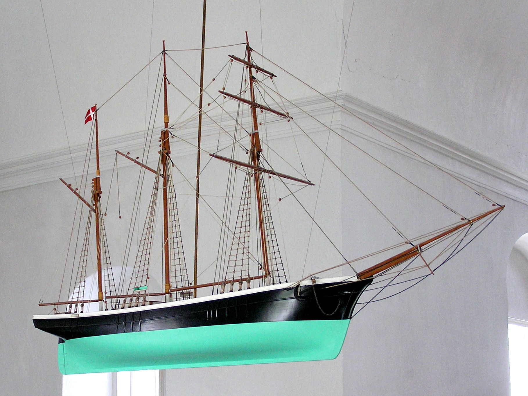 ’Hans Andreas’ er en tre master skonnert, bygget i perioden 1984-1986. Modellen er udført af maler Ove Andersen, Slagelse, som også donerede den til Nexø Kirke. Det oprindelige skib ’Hans Andreas’ er bygget 1864 af Tømrer J.Brandt og H.L.Blem, Nexø til Købmand P.Berg , Nexø. Blev i 1876 forlænget og omtaklet til tre master skonnert. Januar 1905 blev skibet solgt til Kalmar, Sverige for 4000 kr.